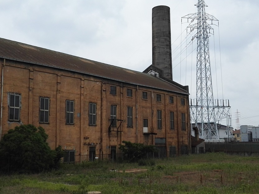 The chimney of Ohama thermal power station, build in 1923